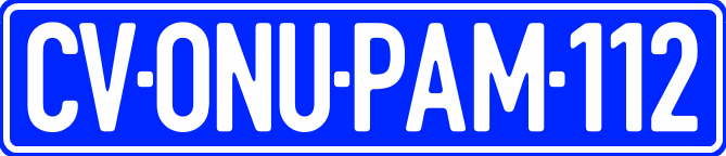 Номерний знак Кабо-Верде